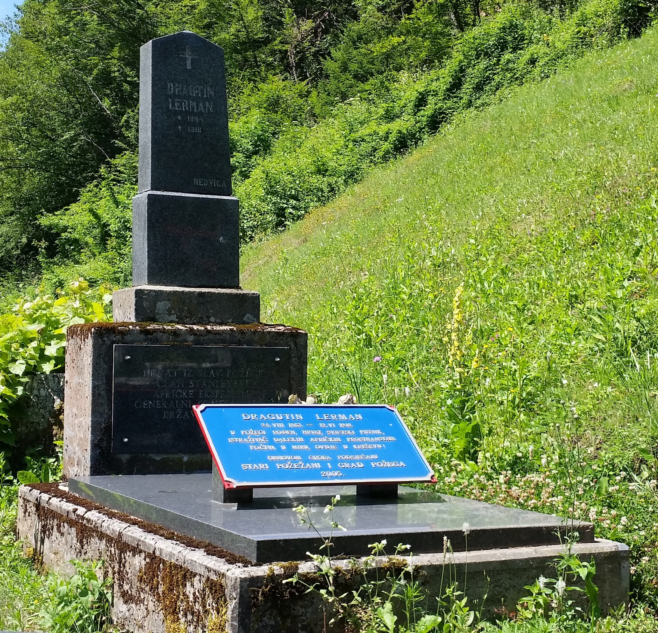 Grob i spomenik Dragutina Lermana na groblju u Kreševu/BIH